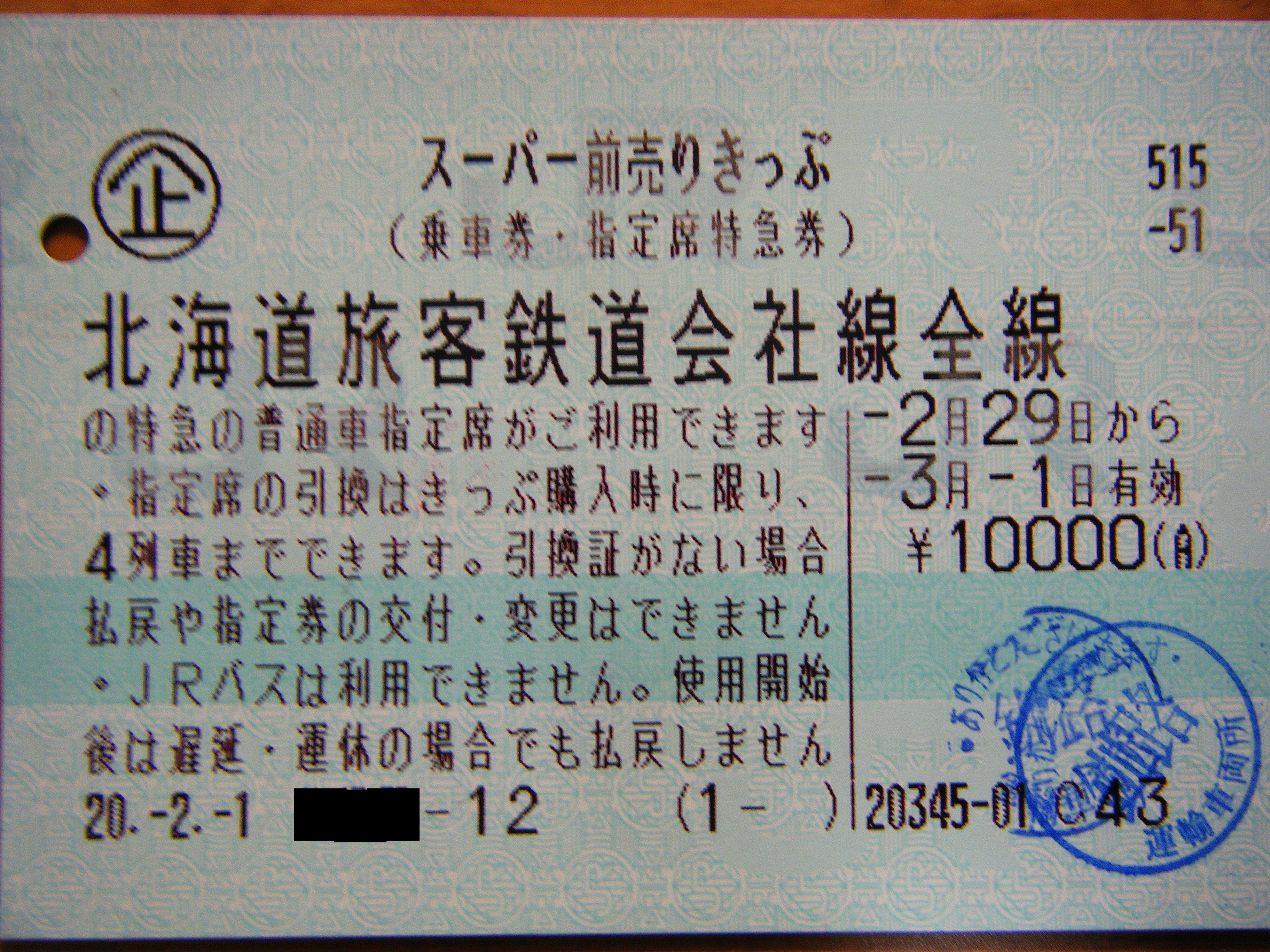 スーパー前売りきっぷ（一部加工済み）